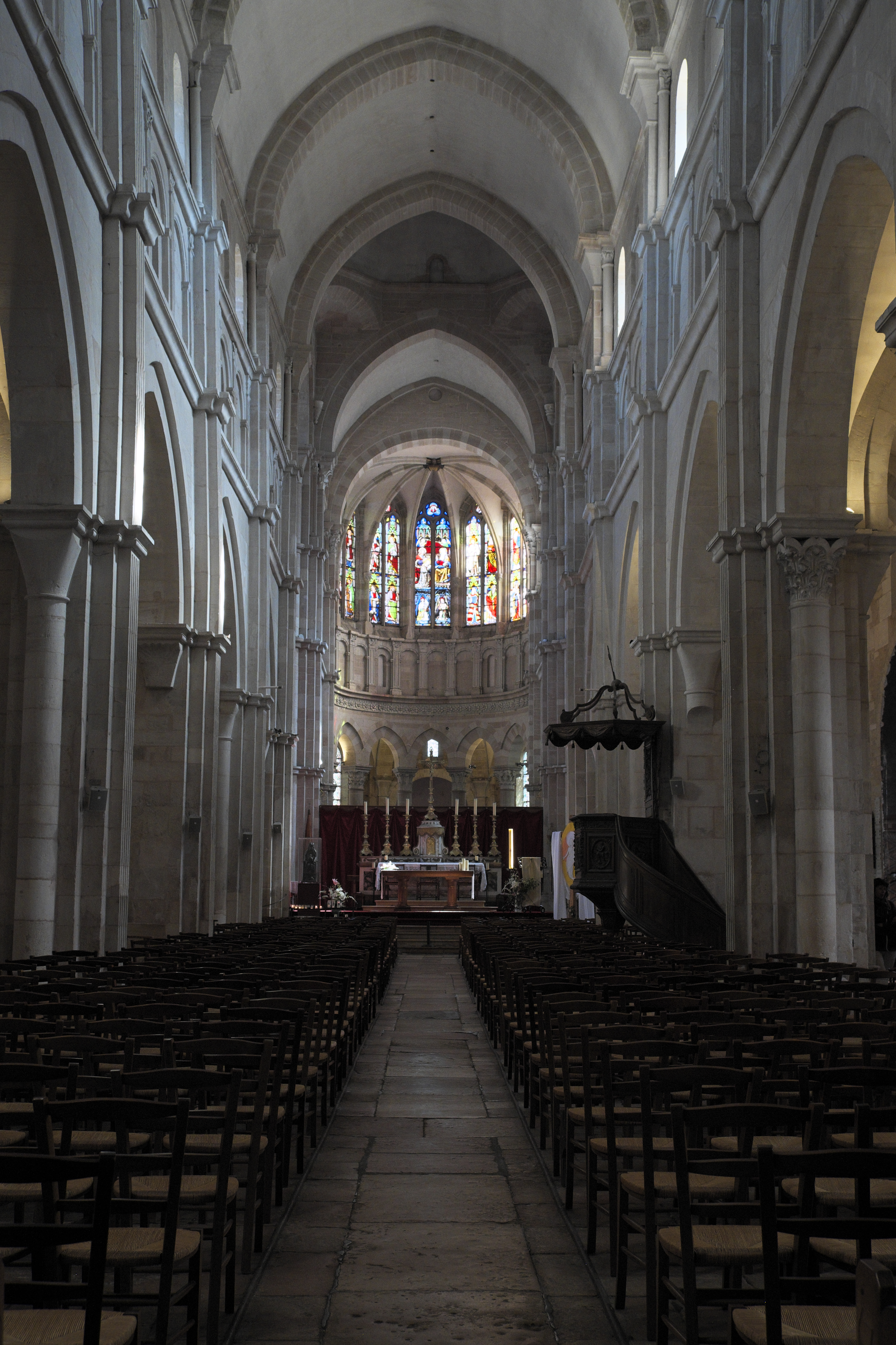 Katholische Pfarrkirche, ehemalige Stiftskirche, Notre-Dame in Beaune im Département Côte-d’Or (Bourgogne-Franche-Comté/Frankreich), Innenraum